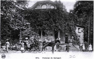 Image anciennne, 1859